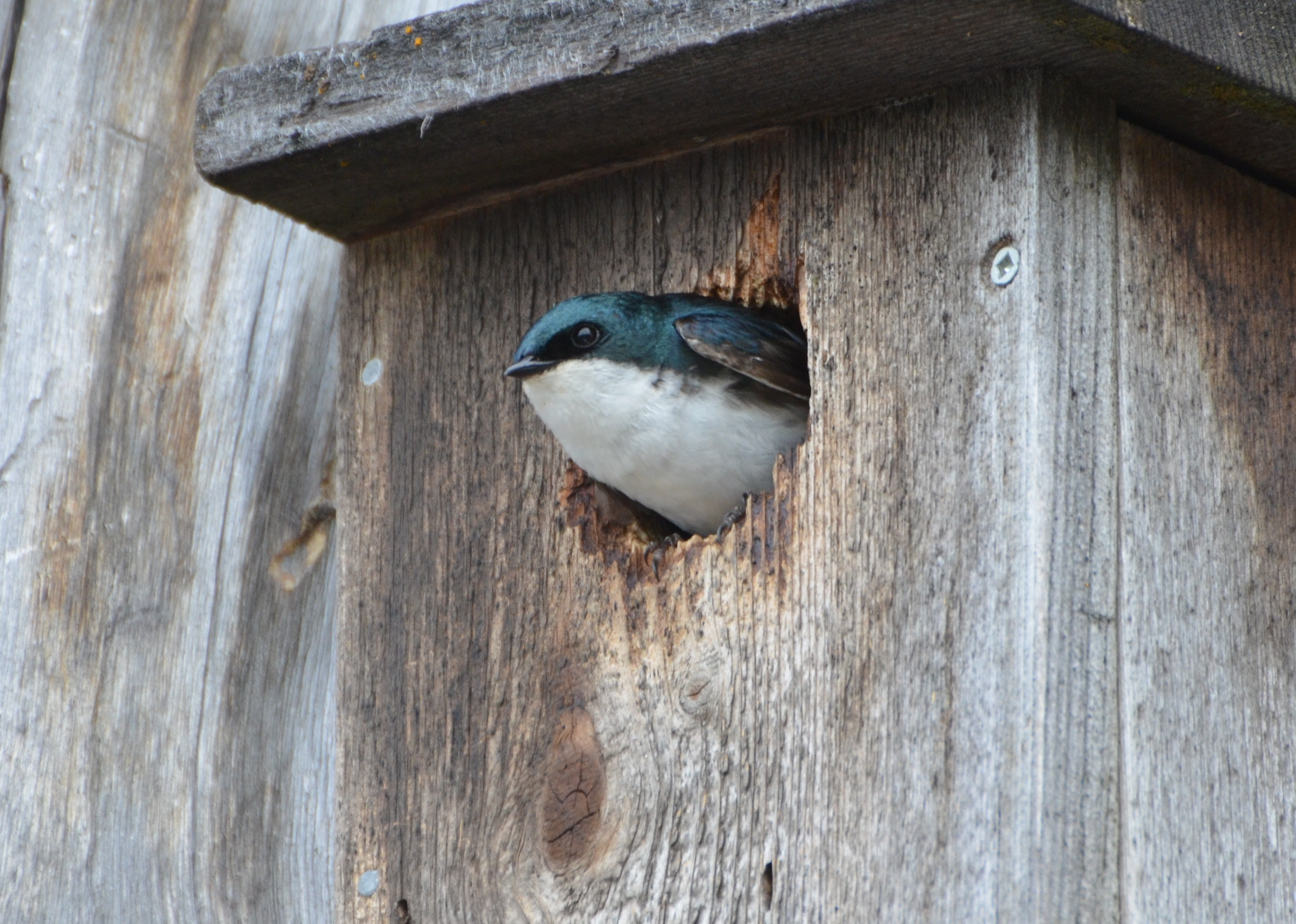 Oregon Trip 2014